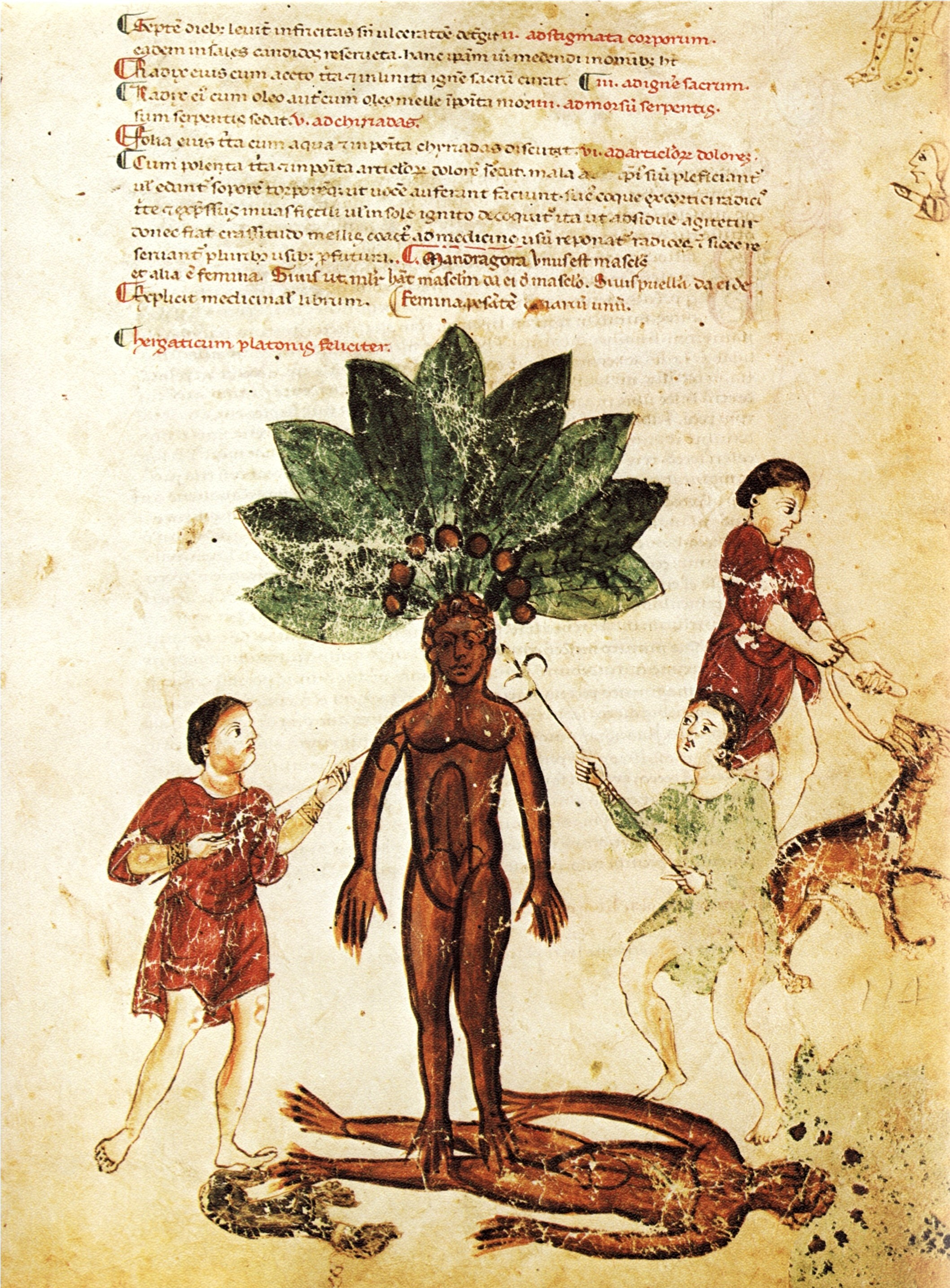 Seite aus dem Kodex Medicina Antiqua (fol. 118 recto). Das Bild zeigt die mythische Ernte einer Alraunwurzel. Der Text darüber erläutert die medizine Anwendung der Pflanze Mandragora (gegen Ausschlag und Gelenkschmerzen)